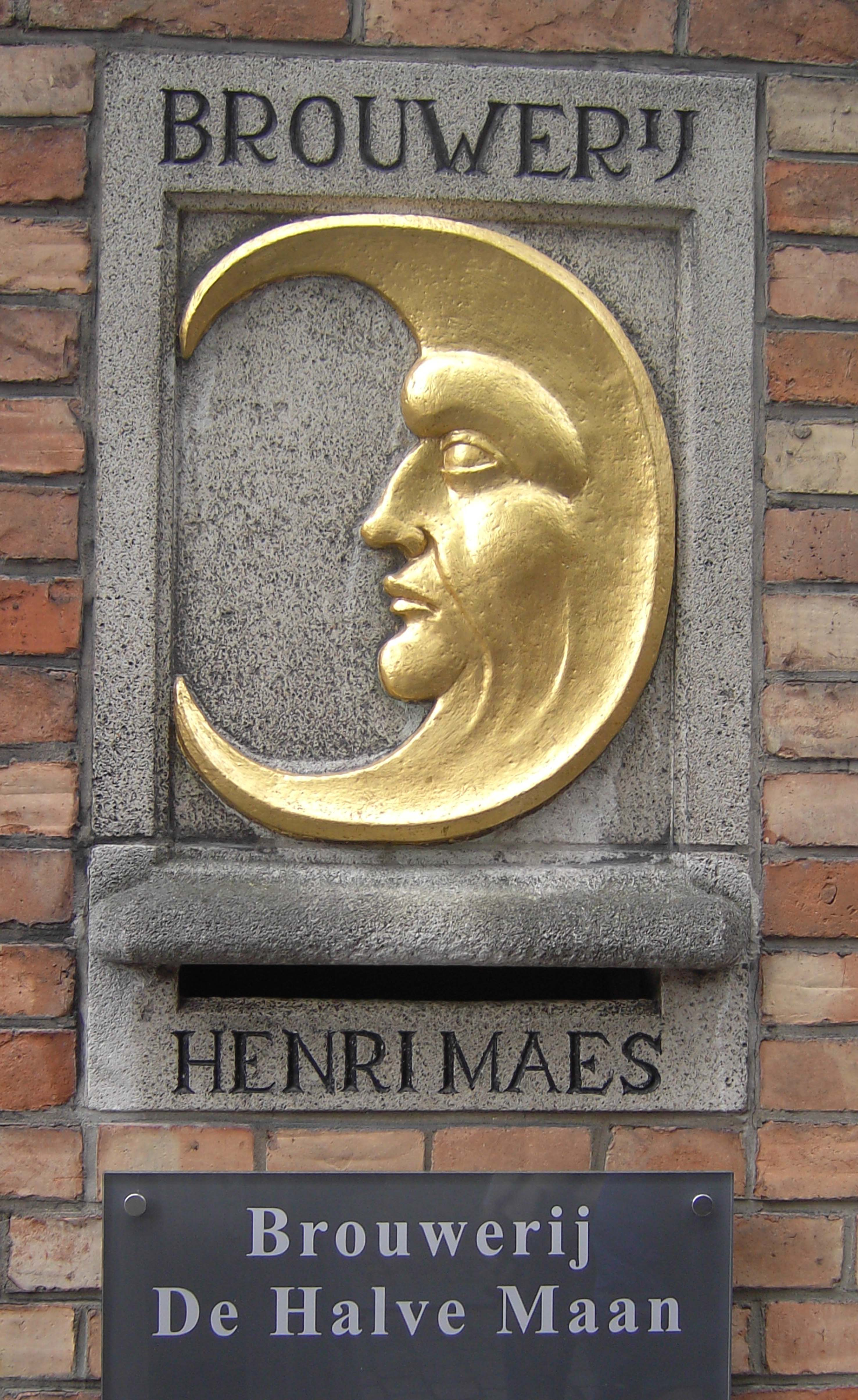 Brugge (België) - Walplein - Brouwerij Halve Maan.